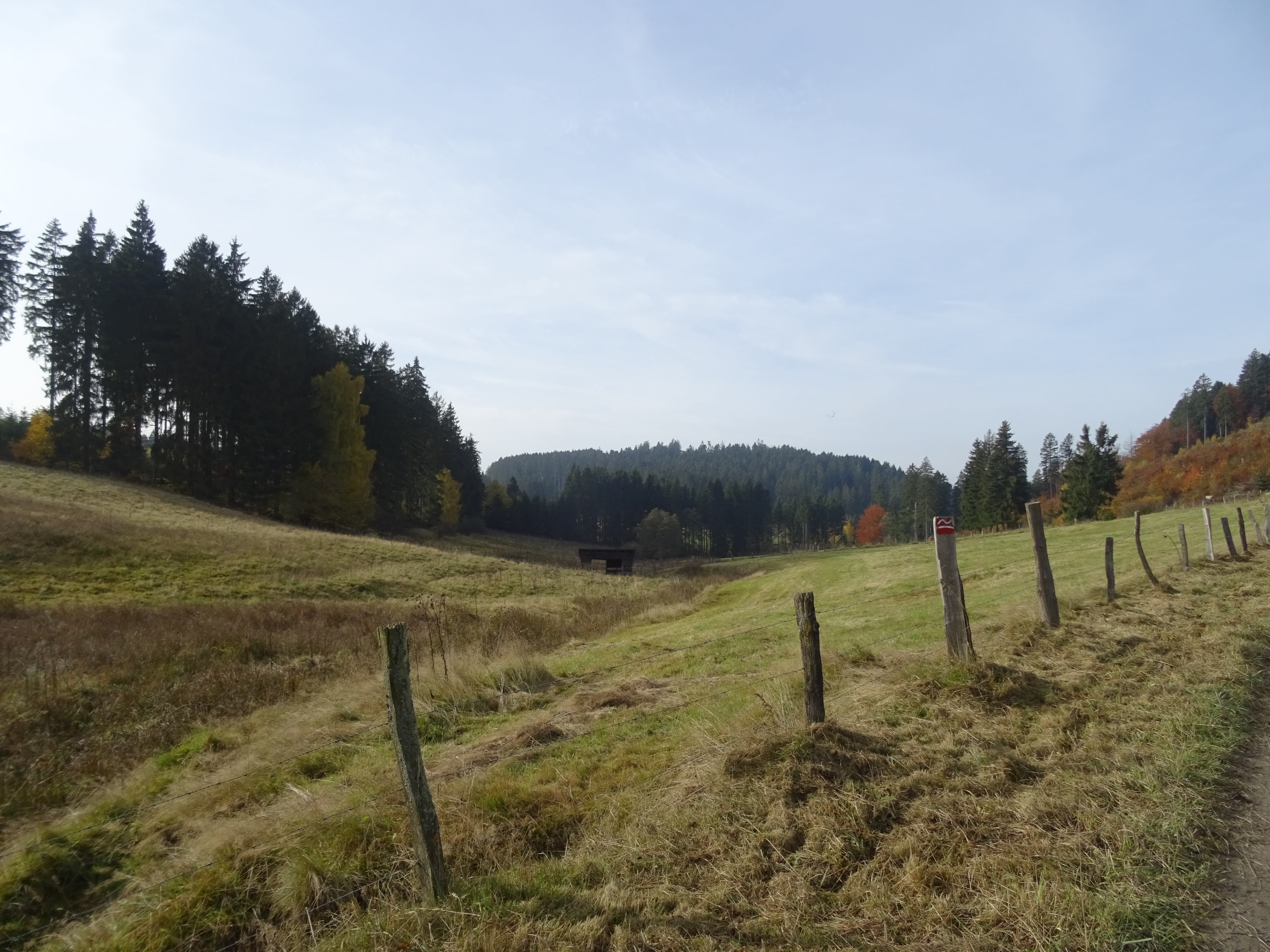 Naturschutzgebiet „Gimmental“ (NSG HSK-195) in Brilon